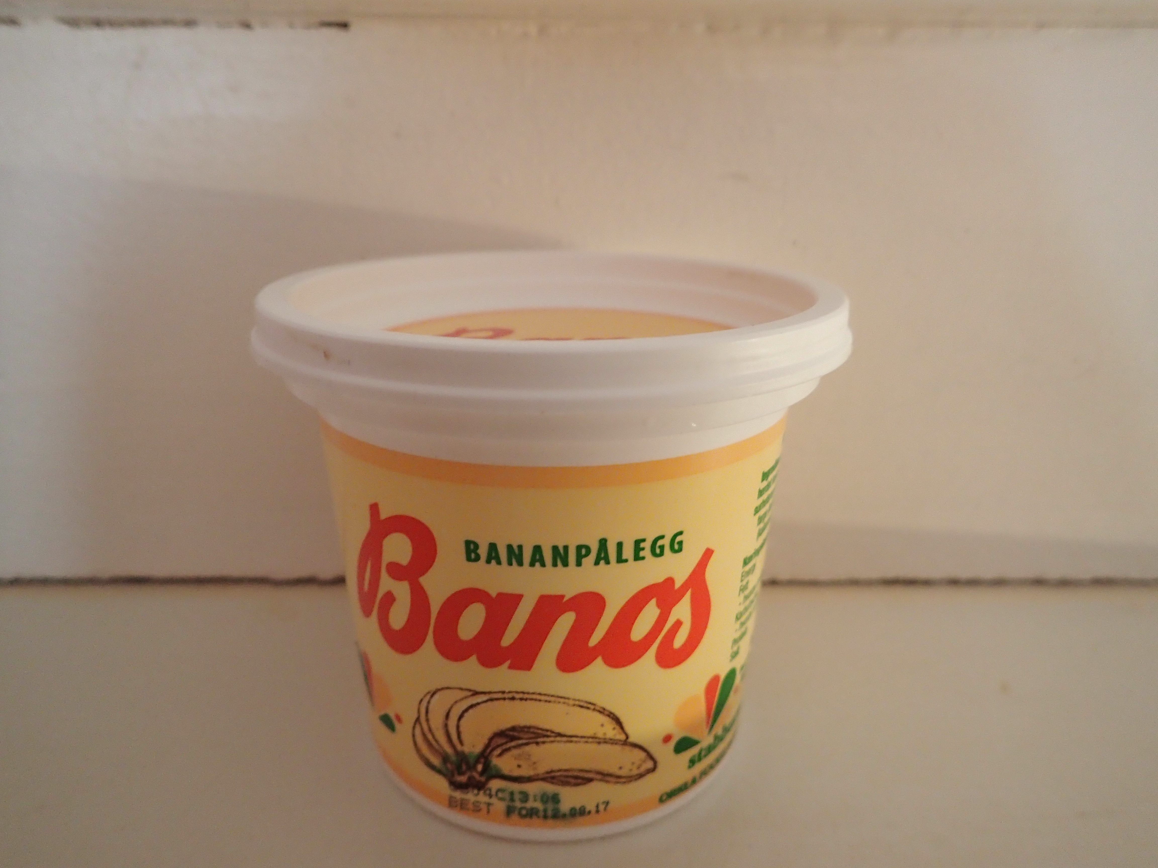 Banos boks